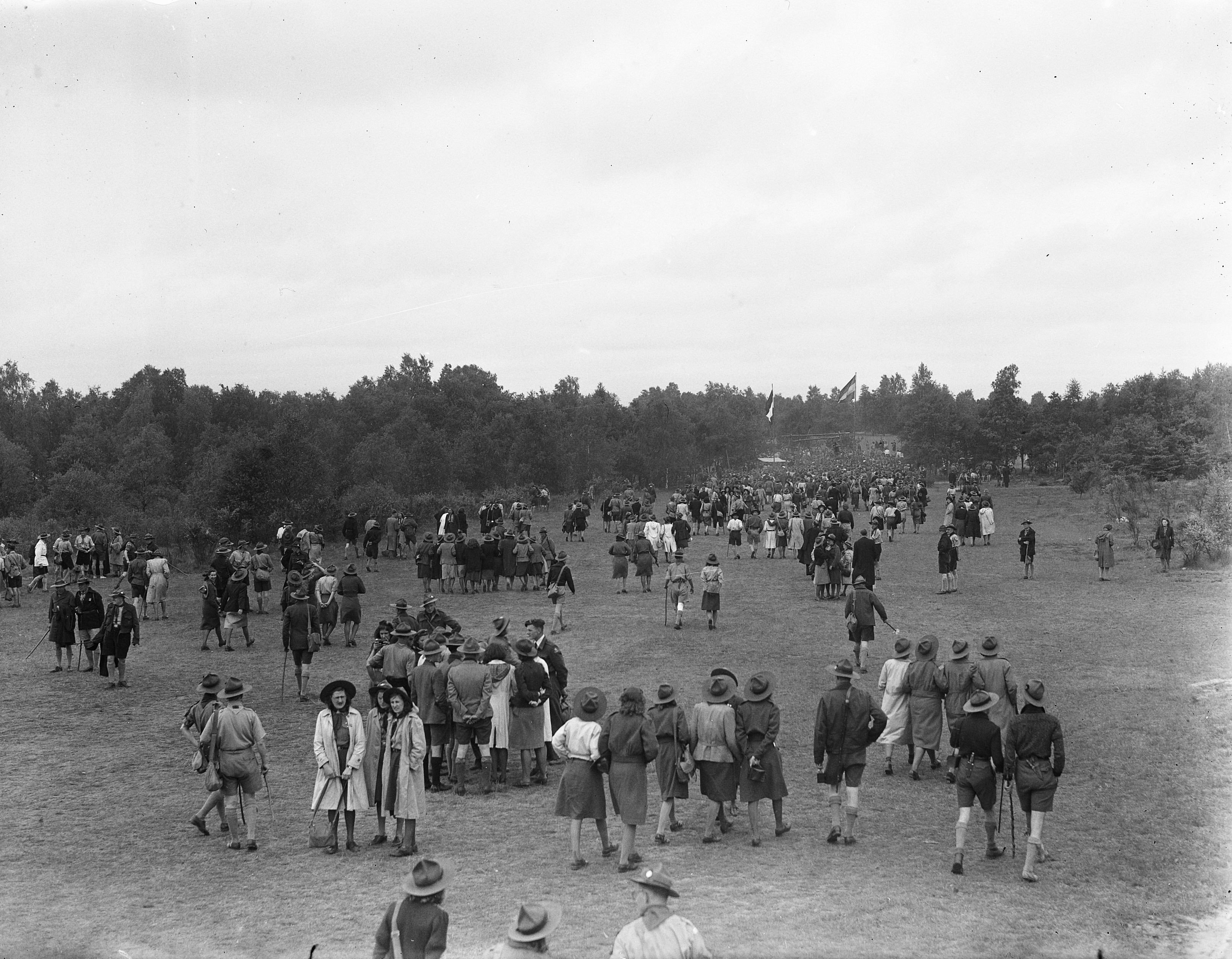 Collectie / Archief : Fotocollectie Anefo Reportage / Serie : [ onbekend ] Beschrijving : verkenners Datum : 23 mei 1948 Locatie : Gelderland, Lunteren Trefwoorden : verkenners Fotograaf : Snikkers, […] / Anefo Auteursrechthebbende : Nationaal Archief Materiaalsoort : Glasnegatief Nummer archiefinventaris : bekijk toegang 2.24.01.09 Bestanddeelnummer : 902-7595 Reacties Geplaatst door Maaike op 07 juni 2011 - 17:37. Rooms Katholieke Koempoelan (jaarlijke bijeenkomst) voor verkenners. Ca. 3000 personen. Trefwoorden: padvinderij ; scouting